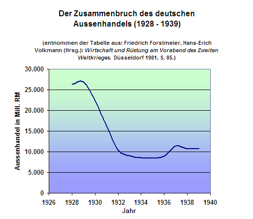 Deutscher Aussenhandel 1928 bis 1939